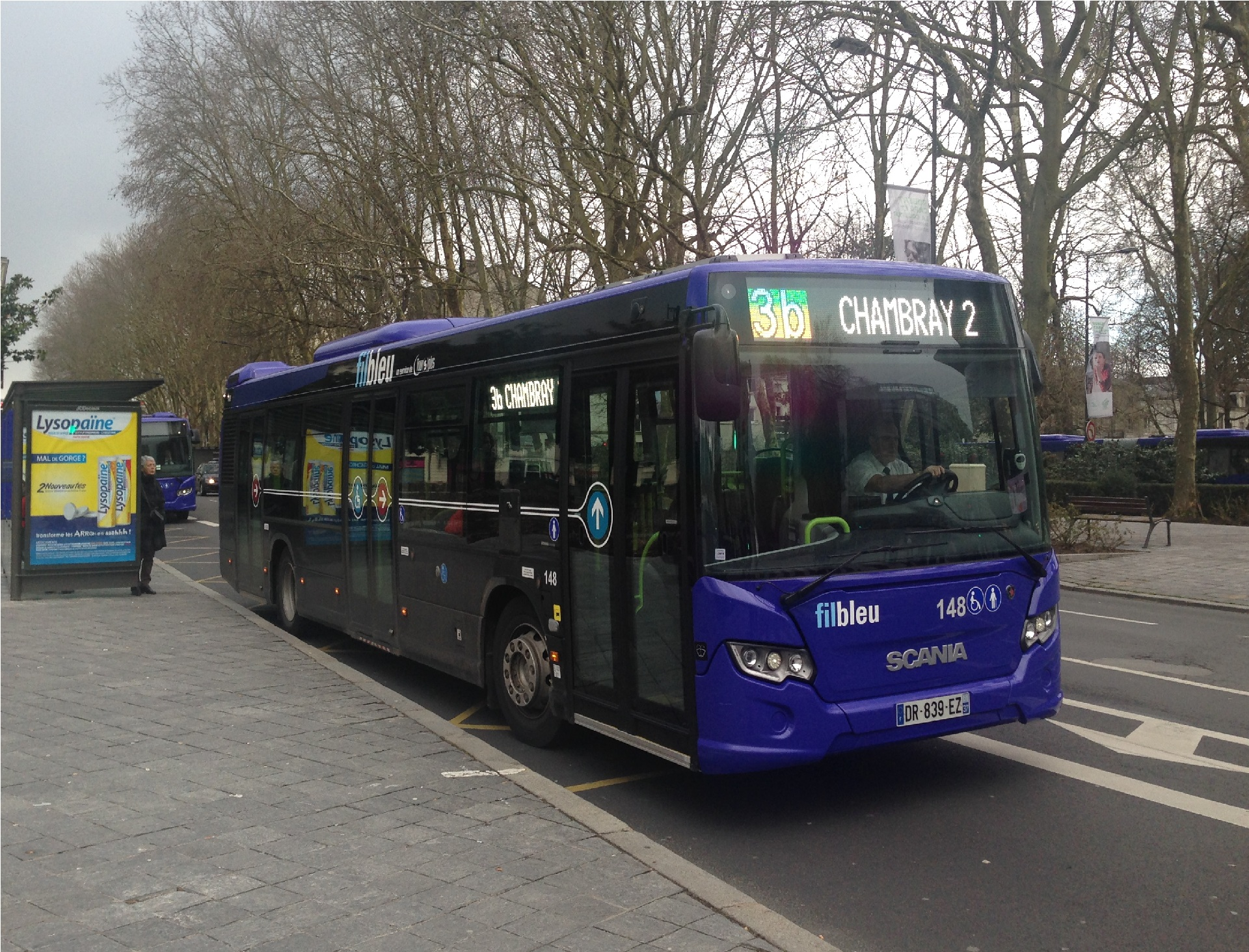 停靠于图尔公交车站“Gare Vinci”的一辆3b路公交车